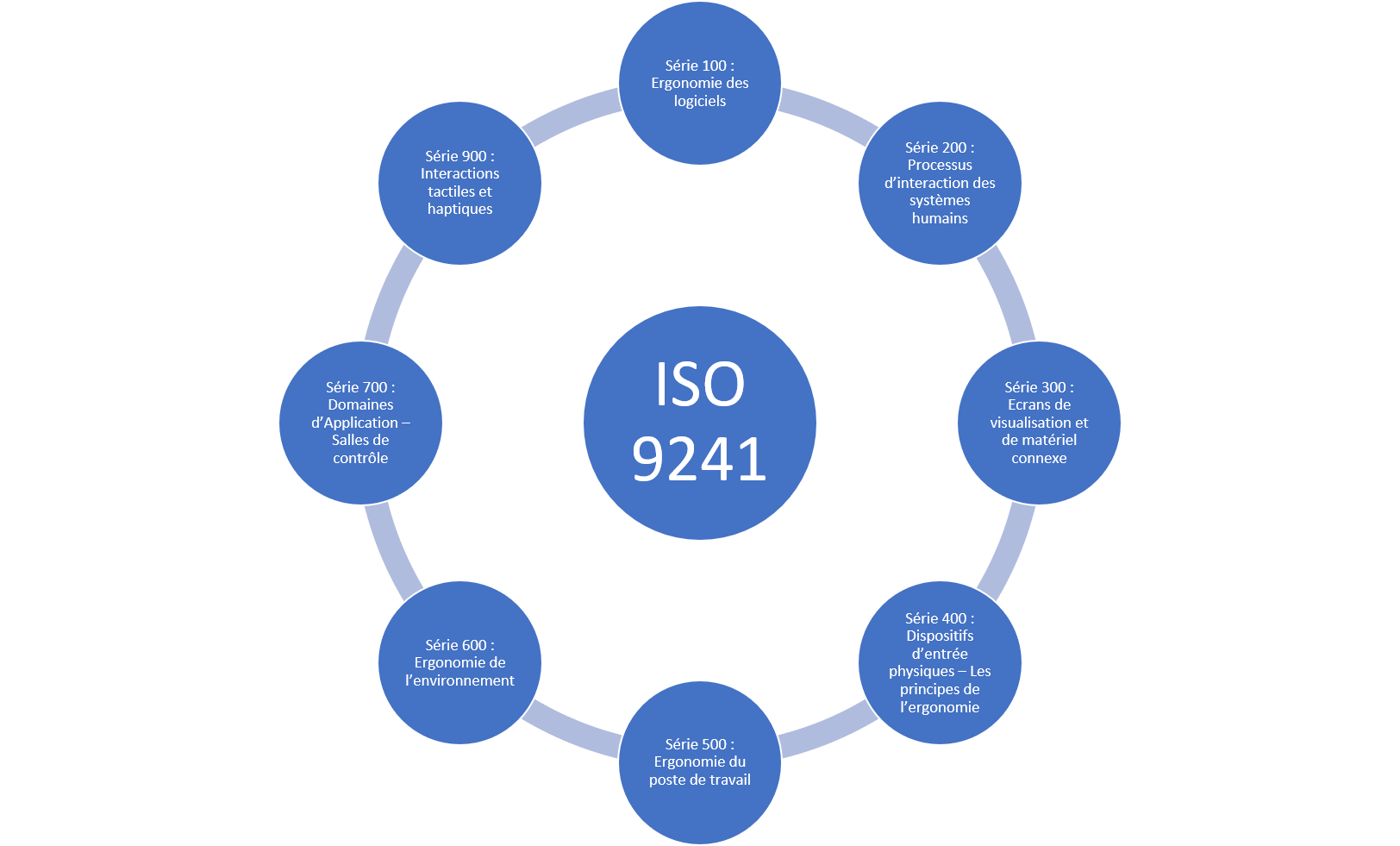 Ce schéma représente les principales composantes de la norme 9241.